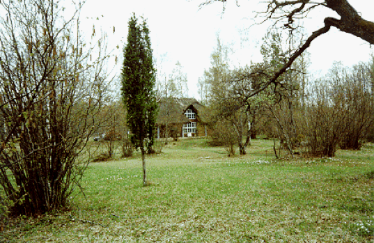 Laelatu puisniit ja bioloogiajaam